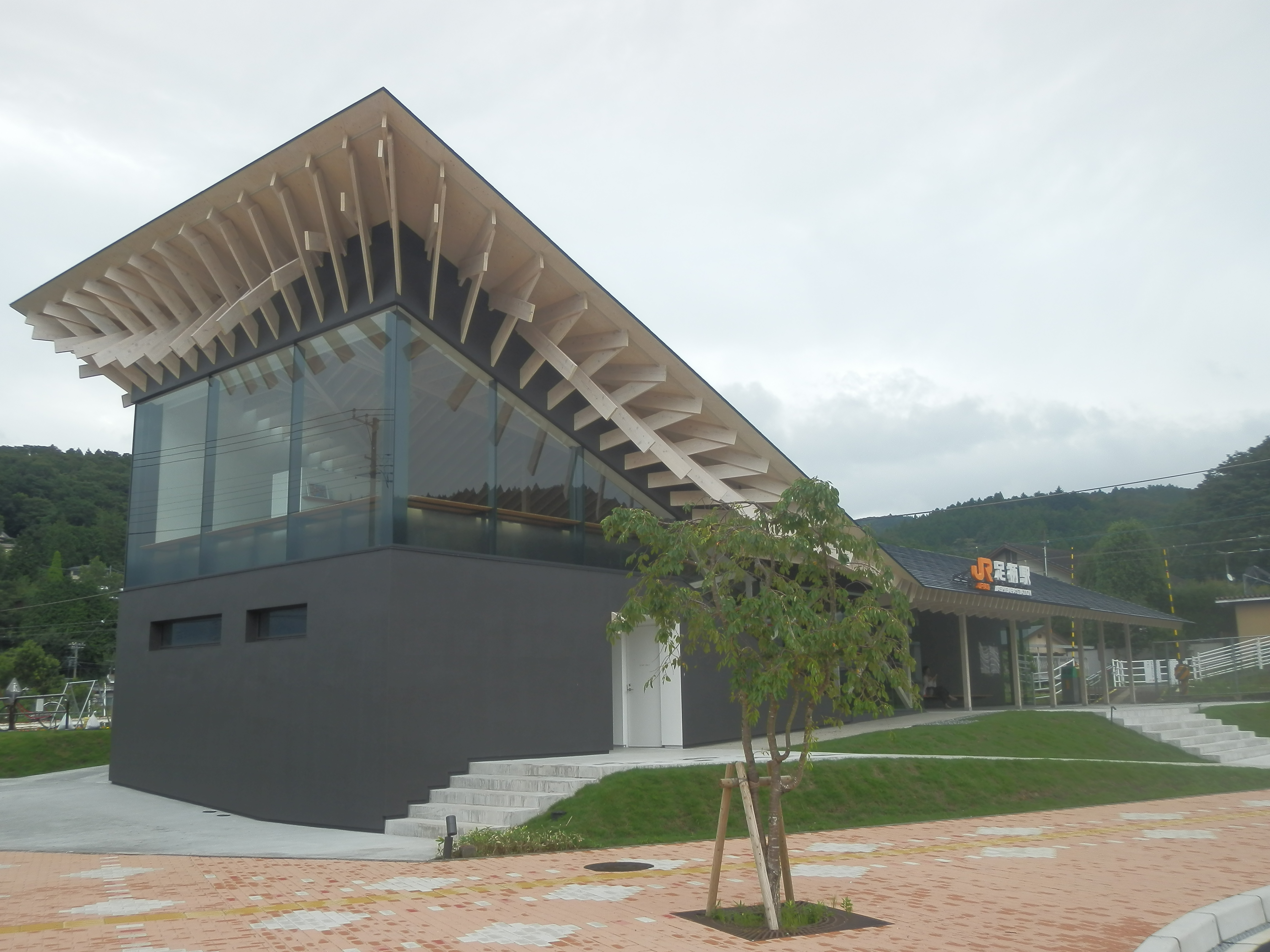 2020年7月7日に供用開始したJR御殿場線足柄駅の新駅舎。小山町役場足柄支所を兼ね備える足柄駅交流センター併設（画面左手前）。設計は隈研吾で、屋根は日本建築の垂木を意匠し、地元の金時材を使用。